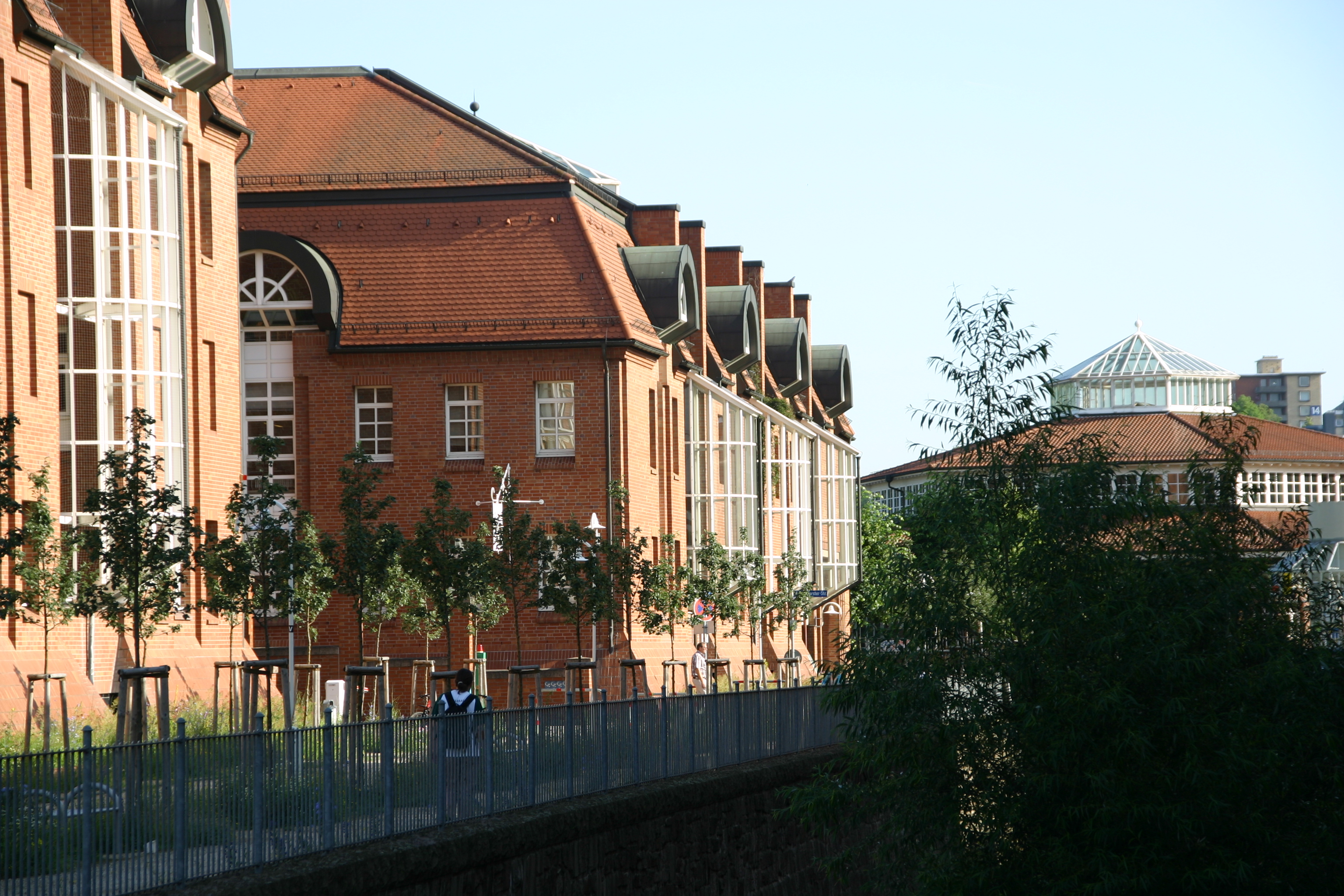 Detail auf dem Campus der Hochschule